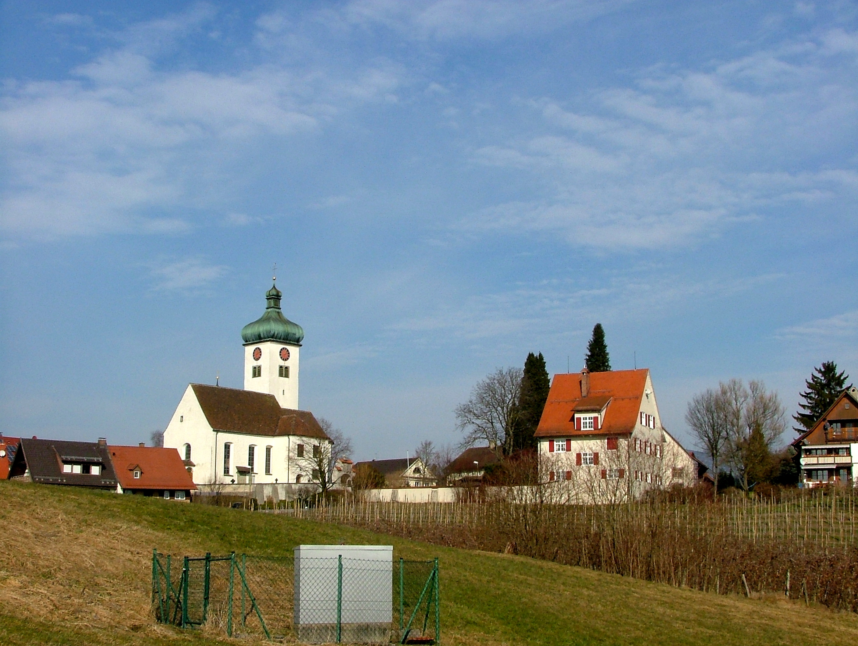 Unterreitnau